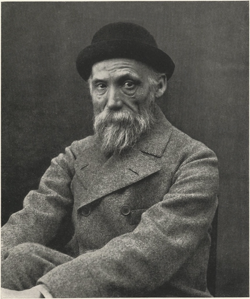 Auguste Renoir, photographie vers 1900